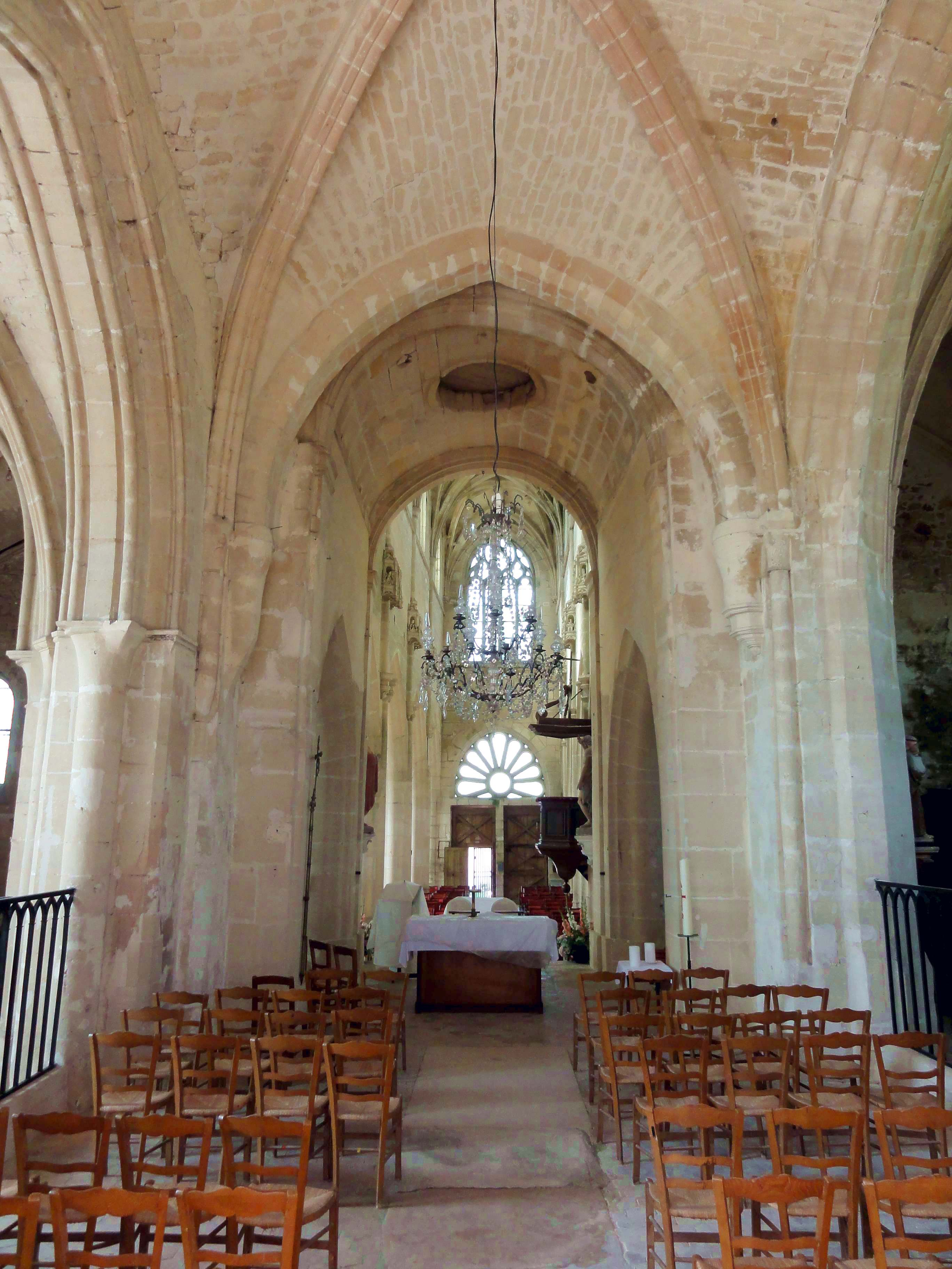 Intérieur de l'église - voir titre.